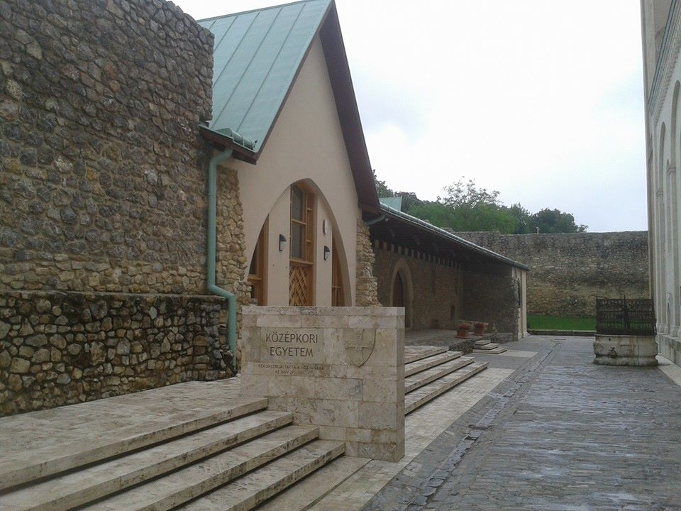 A Pécsett 1367-ben alapított középkori egyetem feltételezett épülete, melyet 2015 májusában nyitottak meg a nagyközönség számára. Az épületben állandó kiállítás látható az egyetem középkori történetről és Pécs közép és török kori történetéről.